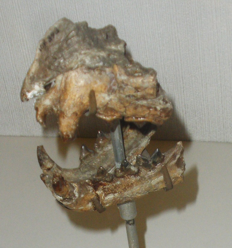 Fossil of Lynx, an extinct mammal- Took the picture at Museo di Paleontologia di Firenze